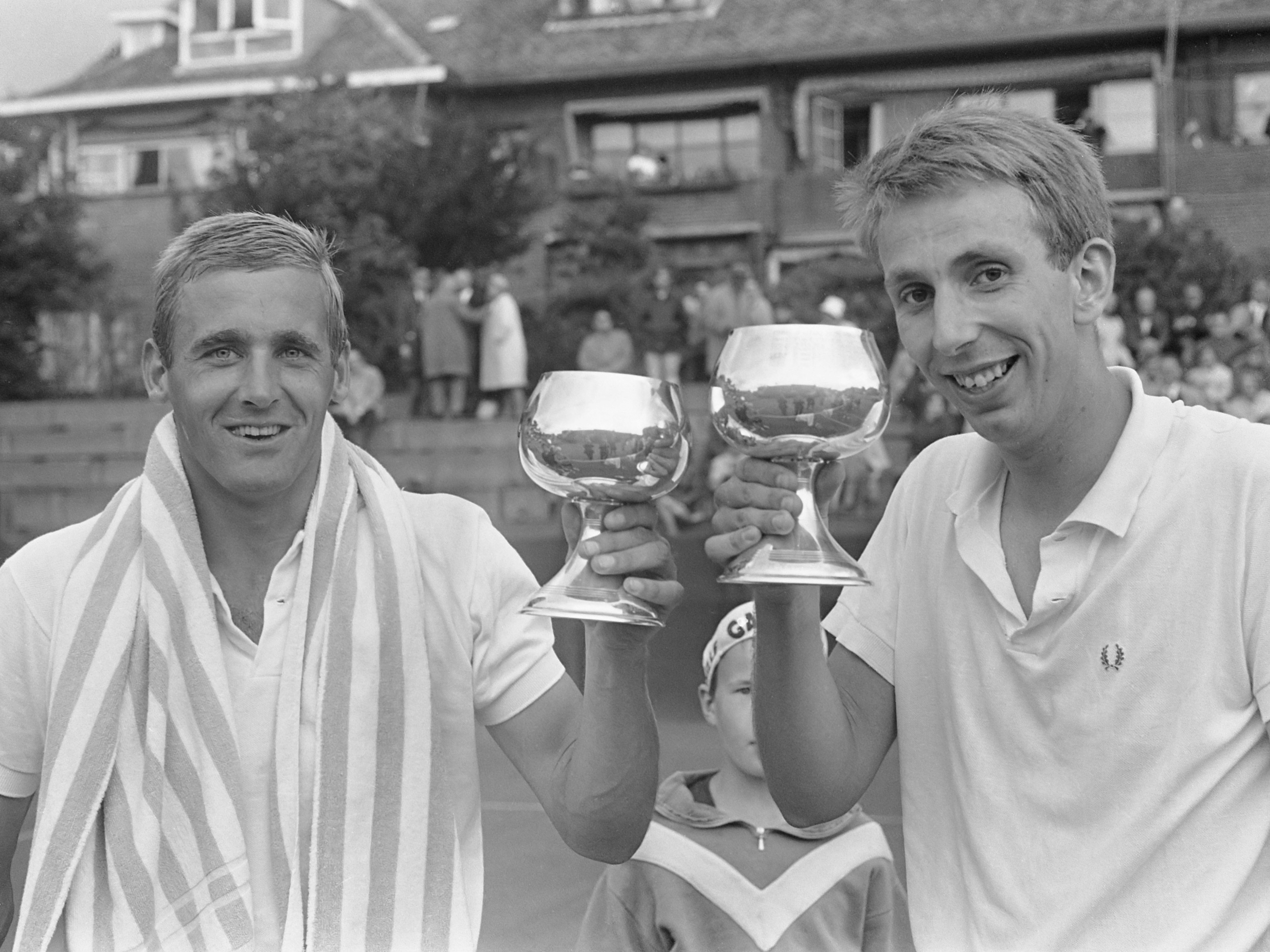 Nederlandse Tenniskampioenschappen Scheveningen. Heren dubbel Jan Hajer (links) en Evert Schneider kampioen (12 augustus 1967)